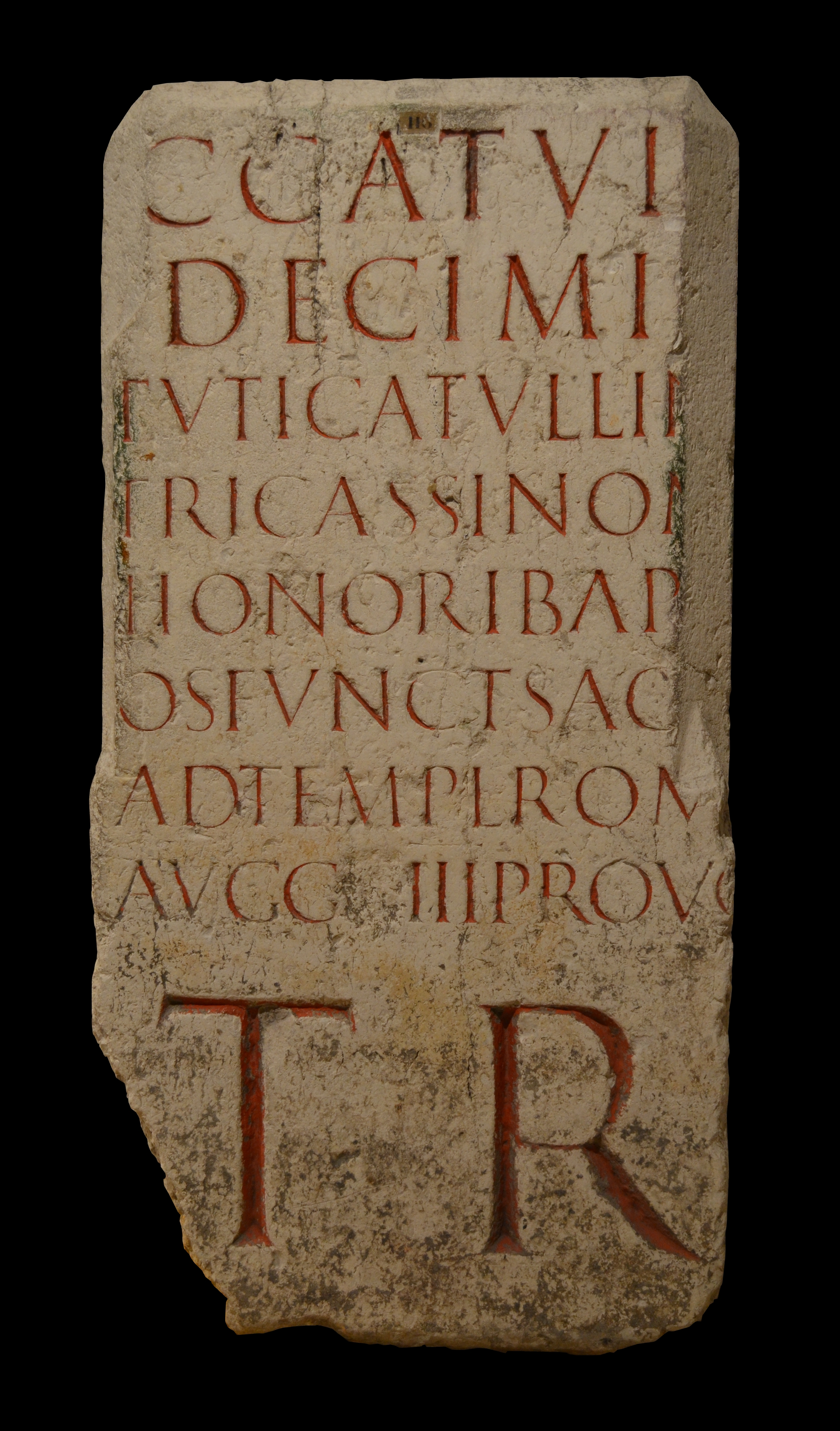 Musée gallo-romain de Fourvière (Lyon) - Stylobate fragmentaire réemployé pour supporter une croix dans l'ancien cimetière de Saint-Pierre-Saint-Saturnin à Lyon. Haut. 166cm ; 80cm. C(aio) Catul[lio] / Decimi(no) / Tuti(i) Catullin[i fil(io)] / Tricassin[o omnibus] / honorib(us) ap[ud su]/os funct(o) sca(erdoti) / ad templ(um) Rom(ae) [et] / Auggg III prov(inciae) G[all(iae)] / Tr[es provinciae Galliae] : A Caius Catullius Deciminus, fils de Tutius Catullinus, Tricasse, promu dans sa cité à tous les honneurs prêtre au temps de Rome et des trois augustes, les Trois provinces de Gaule.